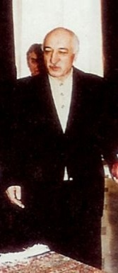 Fethullah Gülen beim Papst